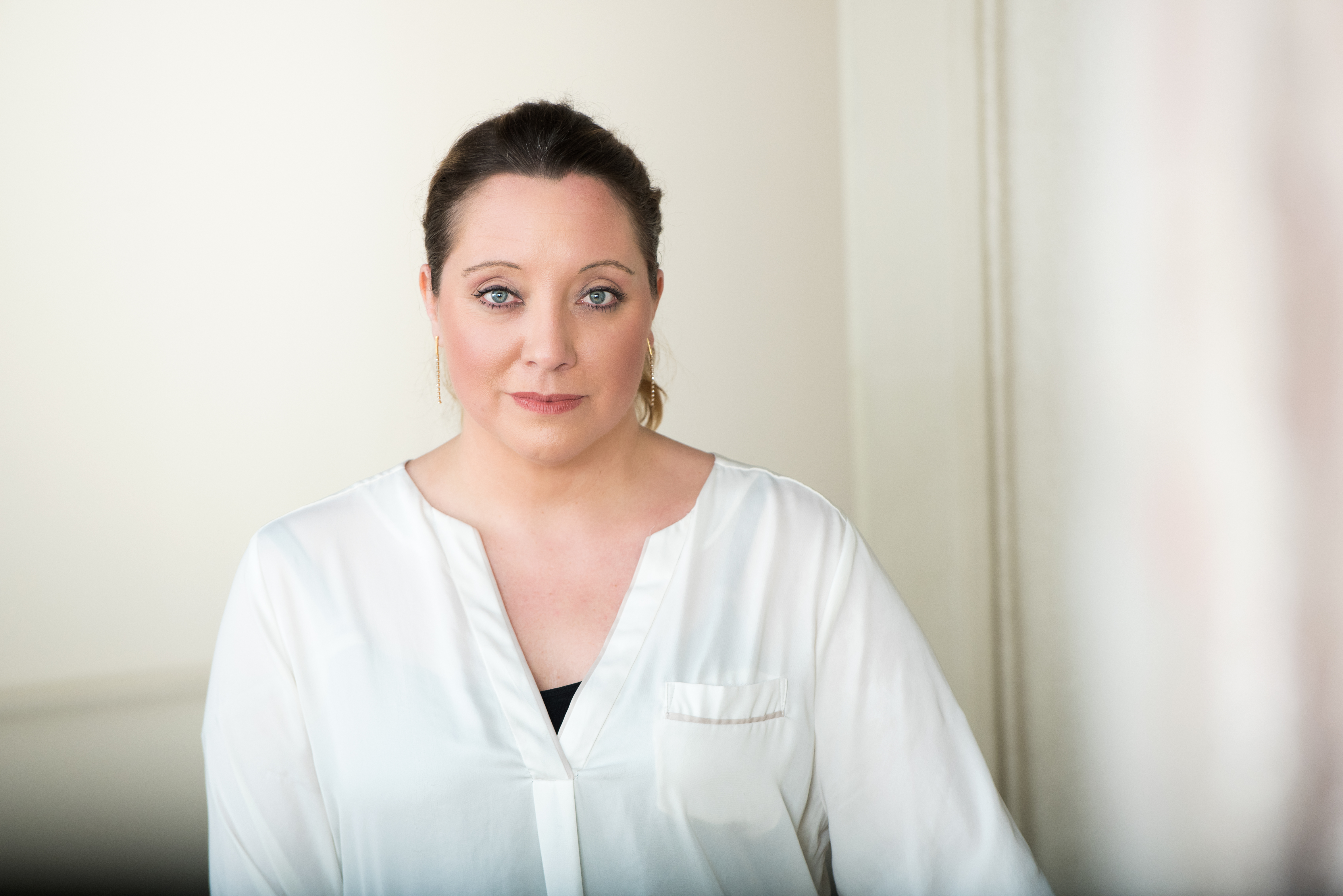 Fotot: Barbara Werren